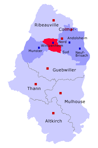 Position du canton de Wintzenheim dans l'arrondissement de Colmar, département du Haut-Rhin